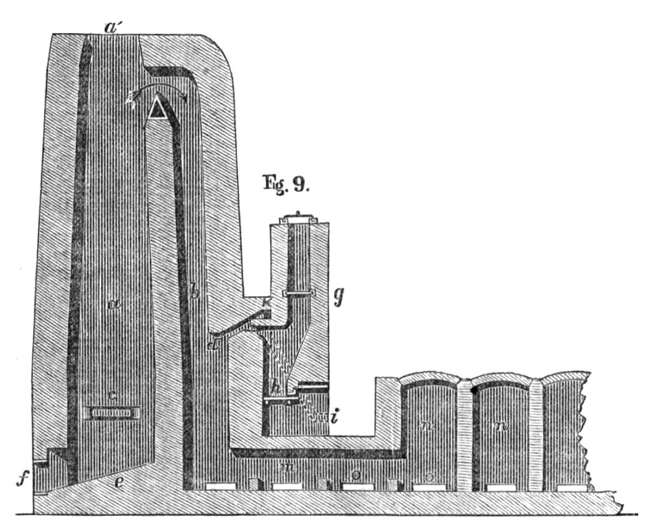 Four à griller les minerais d'argent ou d'or, de Carl August Stetefeldt (ou Charles A. Stetefeldt).